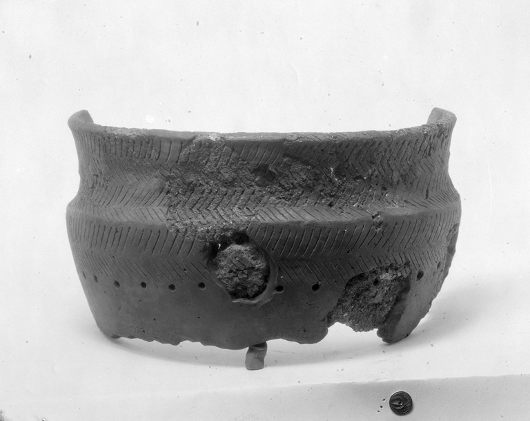 Rekonstruerat lerkärl. Motiv: Alvastra pålbyggnad Nyckelord: Riksintressen Kategori: Arkeologiskt material, Boplats Rekonstruerat lerkärl.